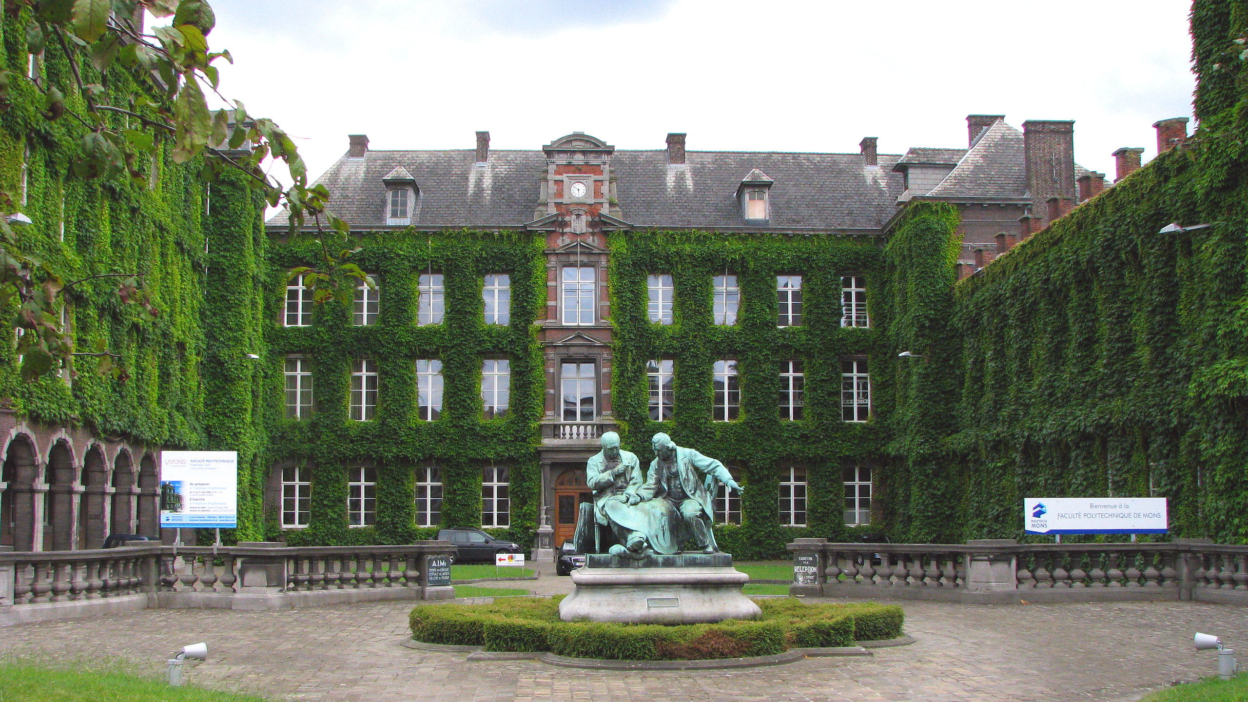 Université de Mons, Faculte Polytechnique de Mons (Gebäude ehem. Collège de Houdain von 1587, Latein-Schule) - Mons (Bergen) in Belgien - Foto Wolfgang Pehlemann IMG_1700